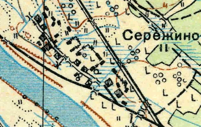 Топографическая карта Ленинградской области, квадрат О-35-21-Г-а (Орлы), деревня Серёжино.